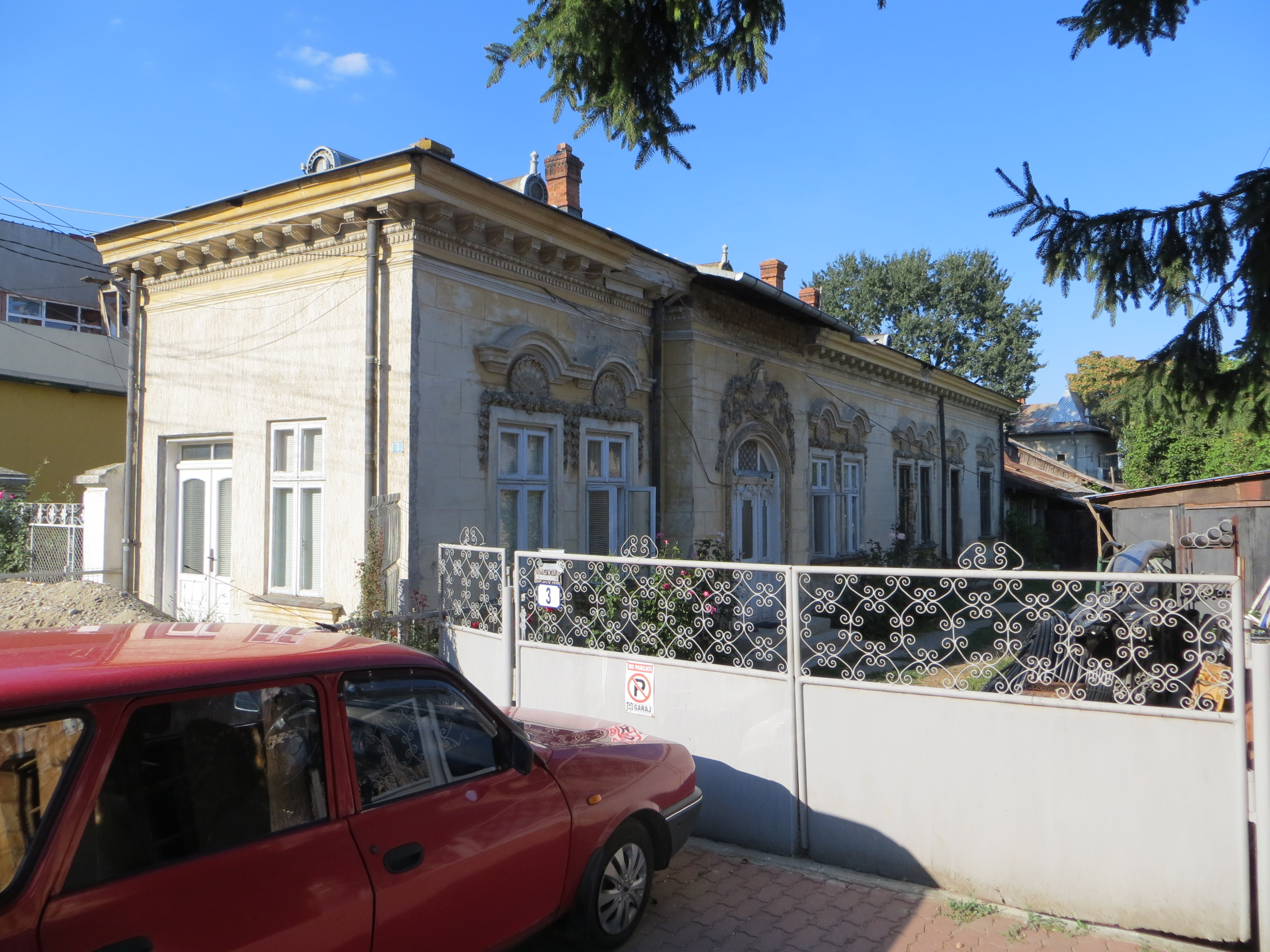 Poșta veche